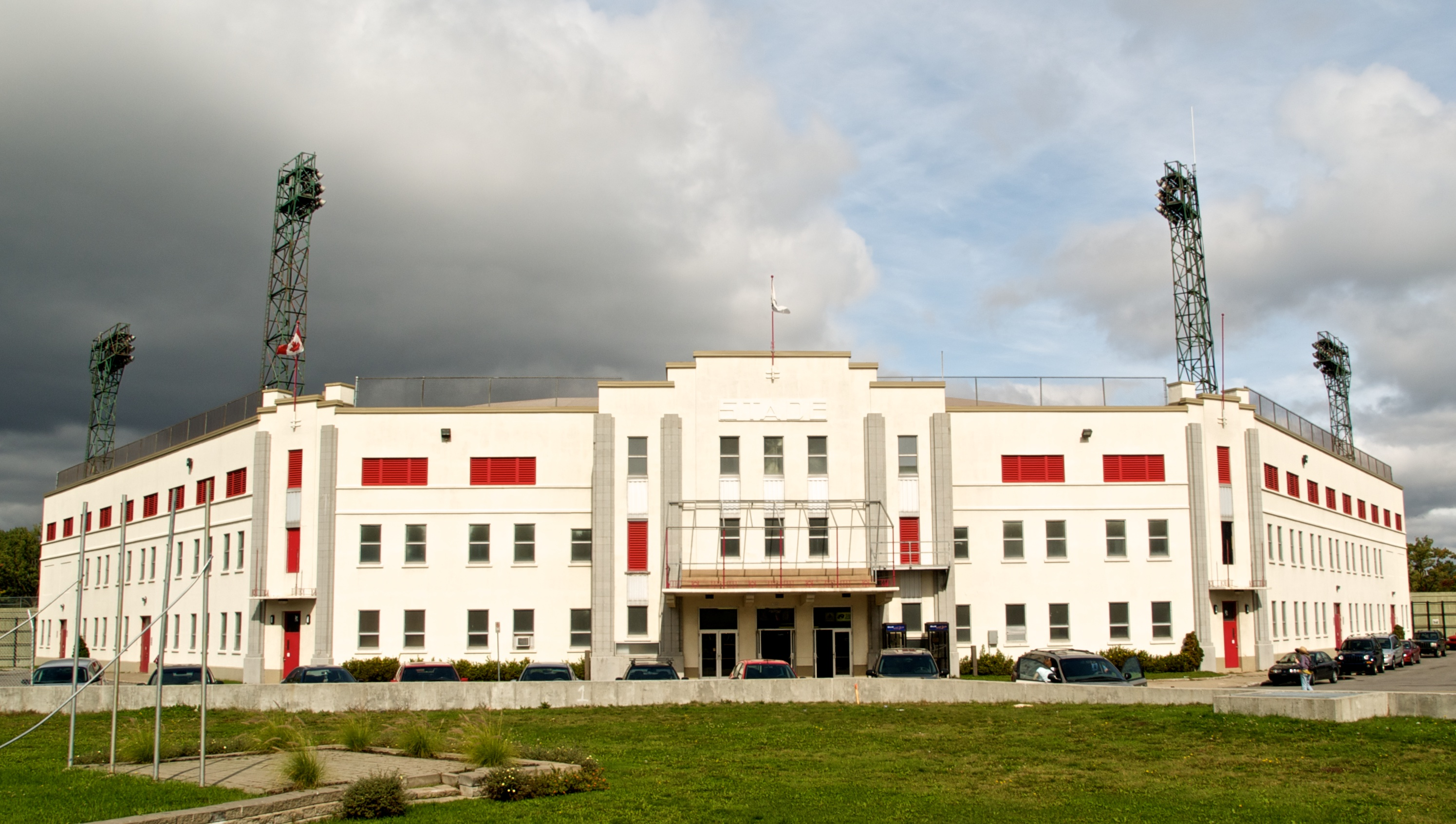 Stade Fernand Bédard in 2008.